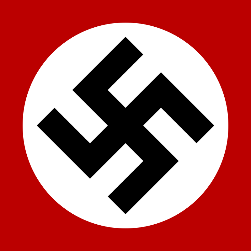 Svastika za vrijeme Trećeg Reicha